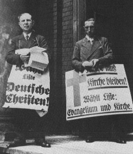 Kirchenratsratswahlen 1933 (Wahlpropaganda vor einer Berliner Kirchengemeinde)//Kopie im Archiv Helms//public domain